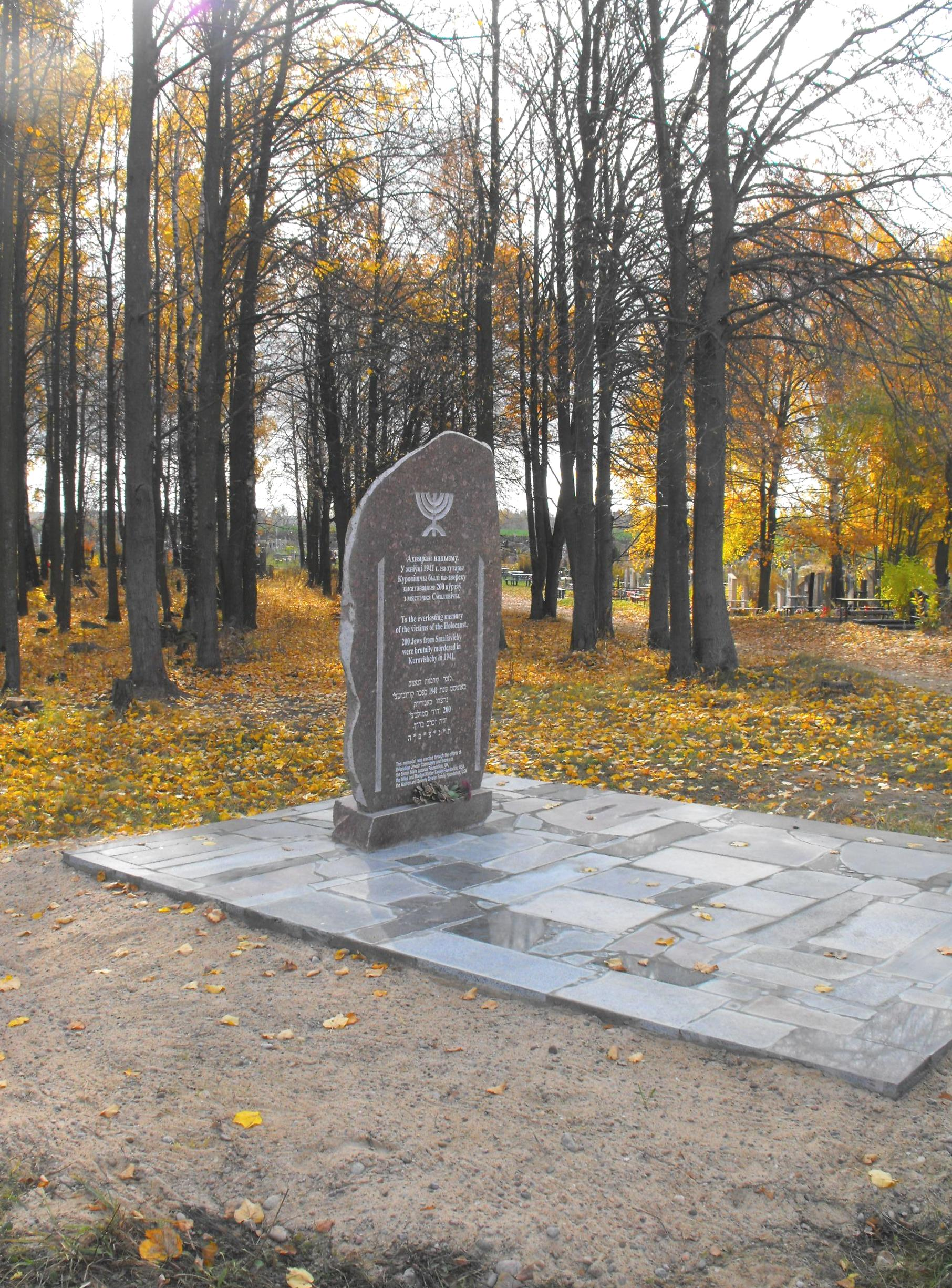 Мемориальный знак в память 200 евреев - узников Смолевичского гетто, убитых нацистами и их пособниками в августе 1941 года возле хутора Куровищи. Находится около еврейского кладбища Смолевич.